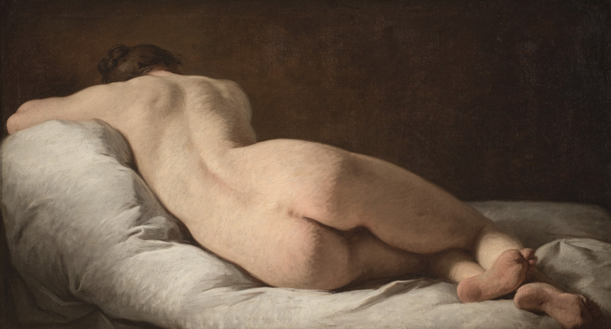 Pierre Subleyras (1699-1749) Nu féminin vu de dos, vers 1732 Huile sur toile - 74 x 136 cm Rome, Gallerie Nazionali Barberini Corsini, Palazzo Barberini Photo : Consorzio Residenze Reali Sabaude